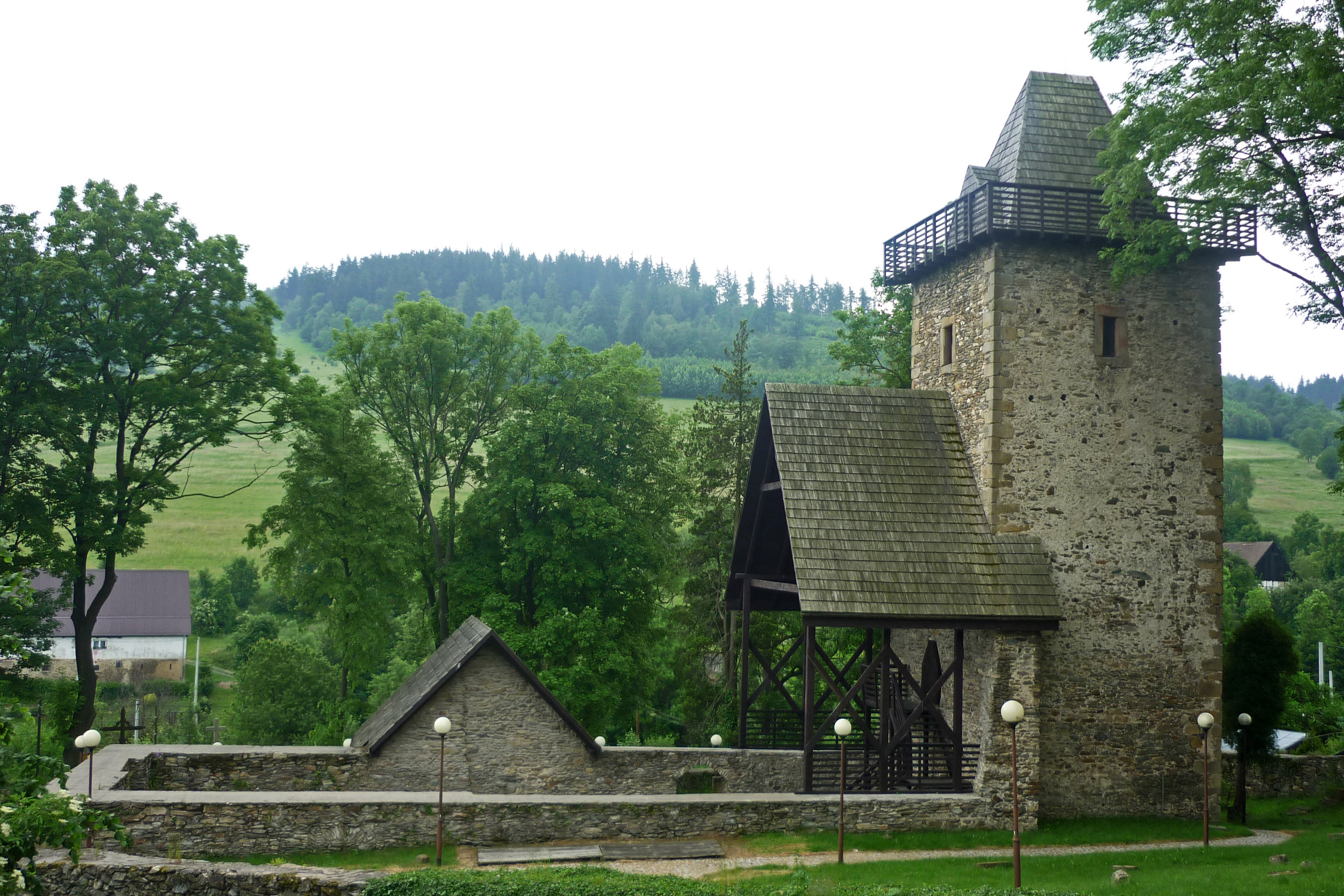 Ehemalige evangelische Kirche in Tiefhartmannsdorf (Podgórki) im Bober-Katzbach-Gebirge in Niederschlesien. Die Kirche wurde Anfang des 19. Jhdts. durch Brand zerstört. Der Kirchturm wird als Aussichtsturm genutzt.